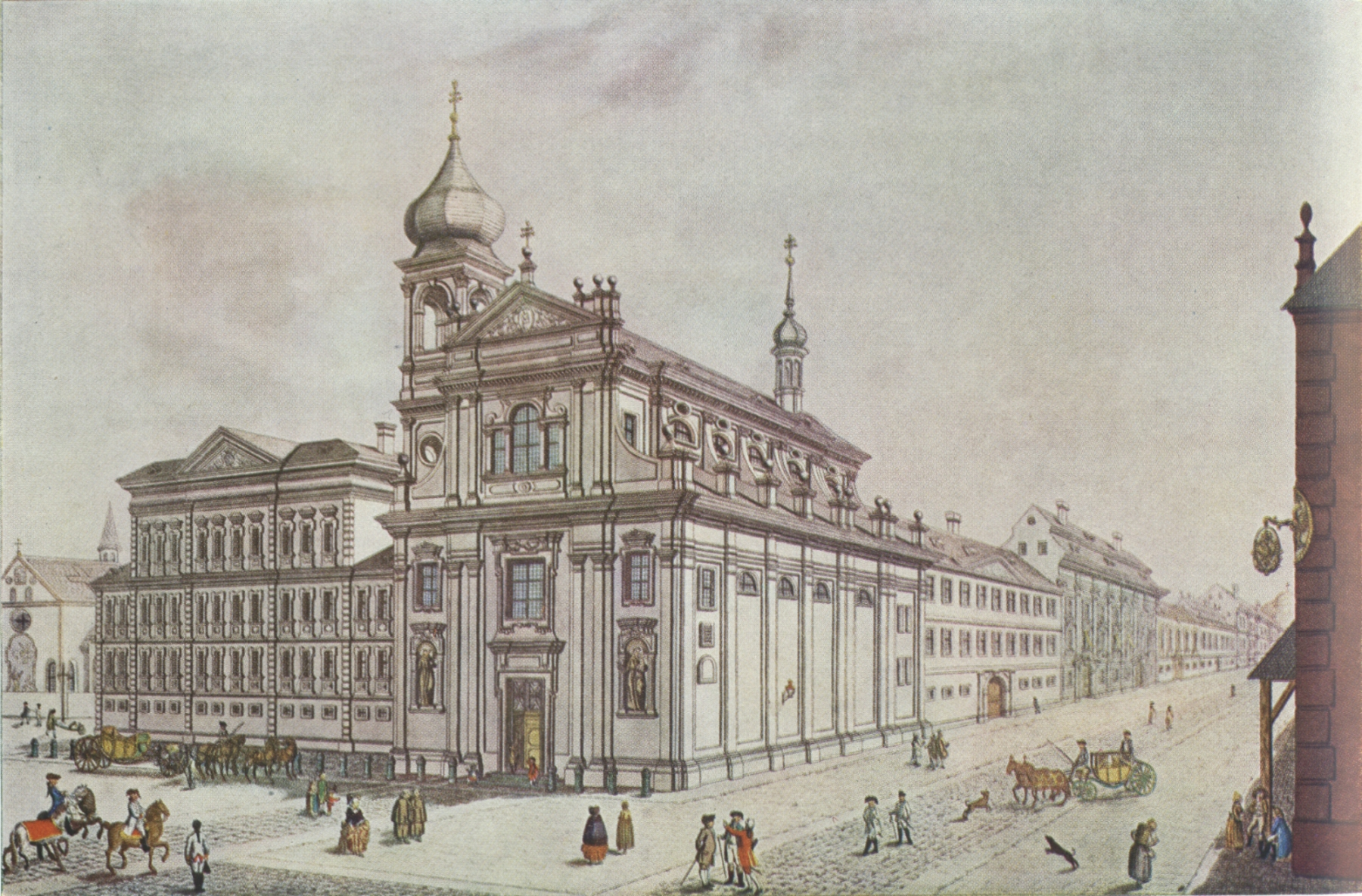 Josef Ant. Scotti de Cassano - Hybernská ulice (1785)